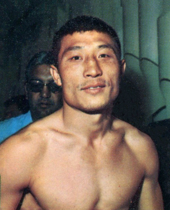 Figurina/Sticker CAMPIONI DELLO SPORT 1968/69-n. 315 - KI SOO KIM -KOR-Rec